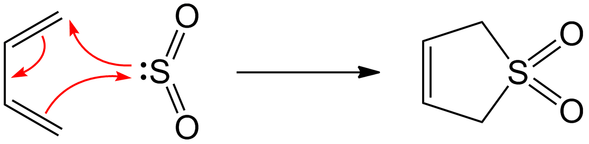 Cheletrope reactie met zwaveldioxide